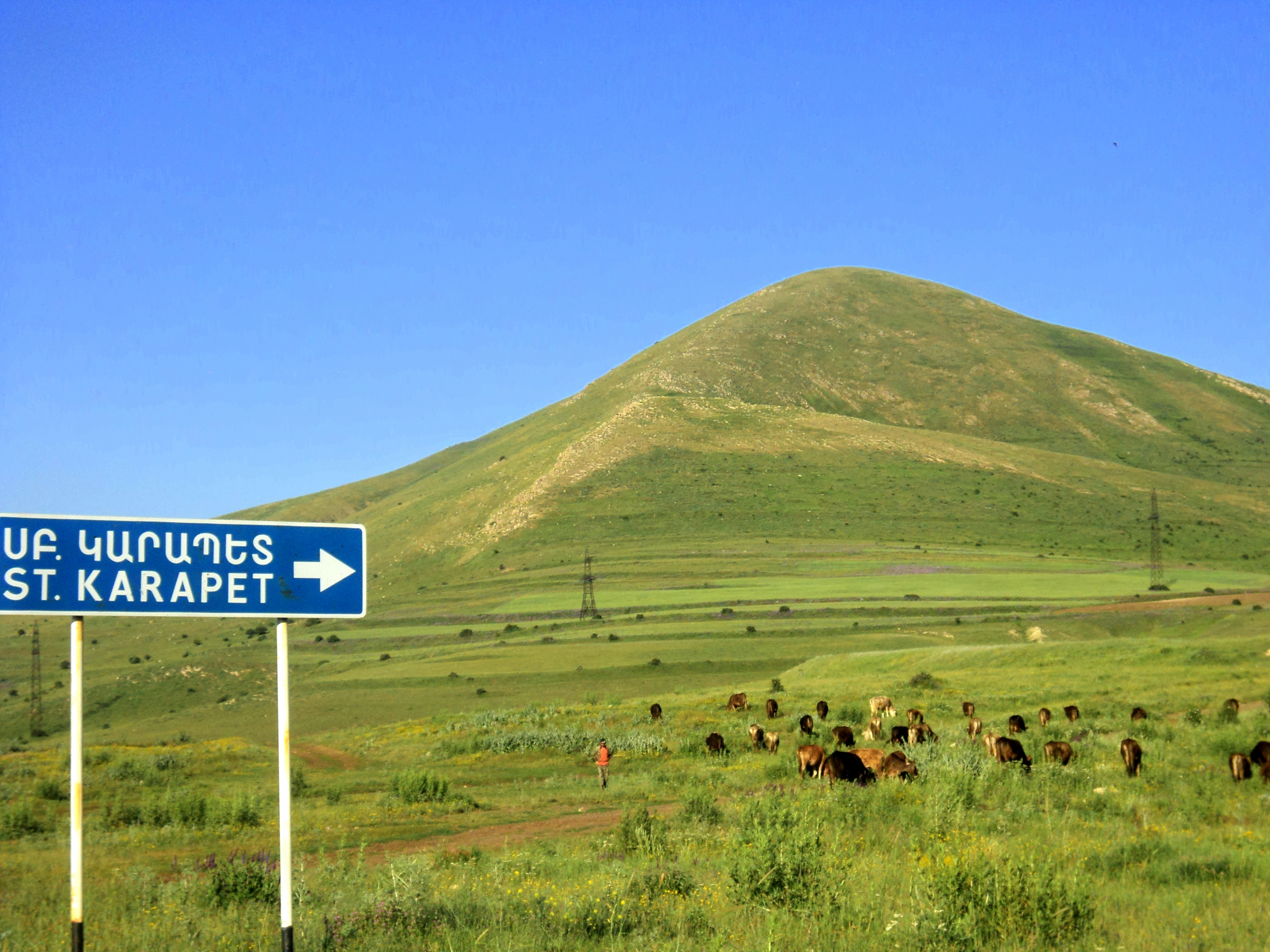 Lousashogh, St Karapet